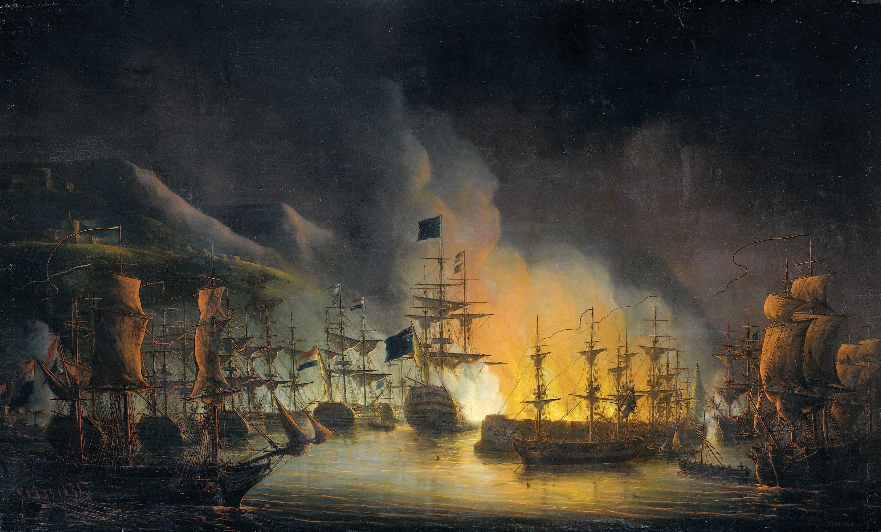 Het bombardement van Algiers, op 26-27 augustus 1816, met de schepen die een bombardement uitvoeren in de nacht. Het bombardement van Algiers door de gecombineerde Engels-Nederlandse vloot, onder commando van Lord Exmouth en Baron van der Capelle, was bedoeld om het ultimatum tot vrijlating van blanke slaven te ondersteunen. Collection: schilderijen; marinemodellenkamer